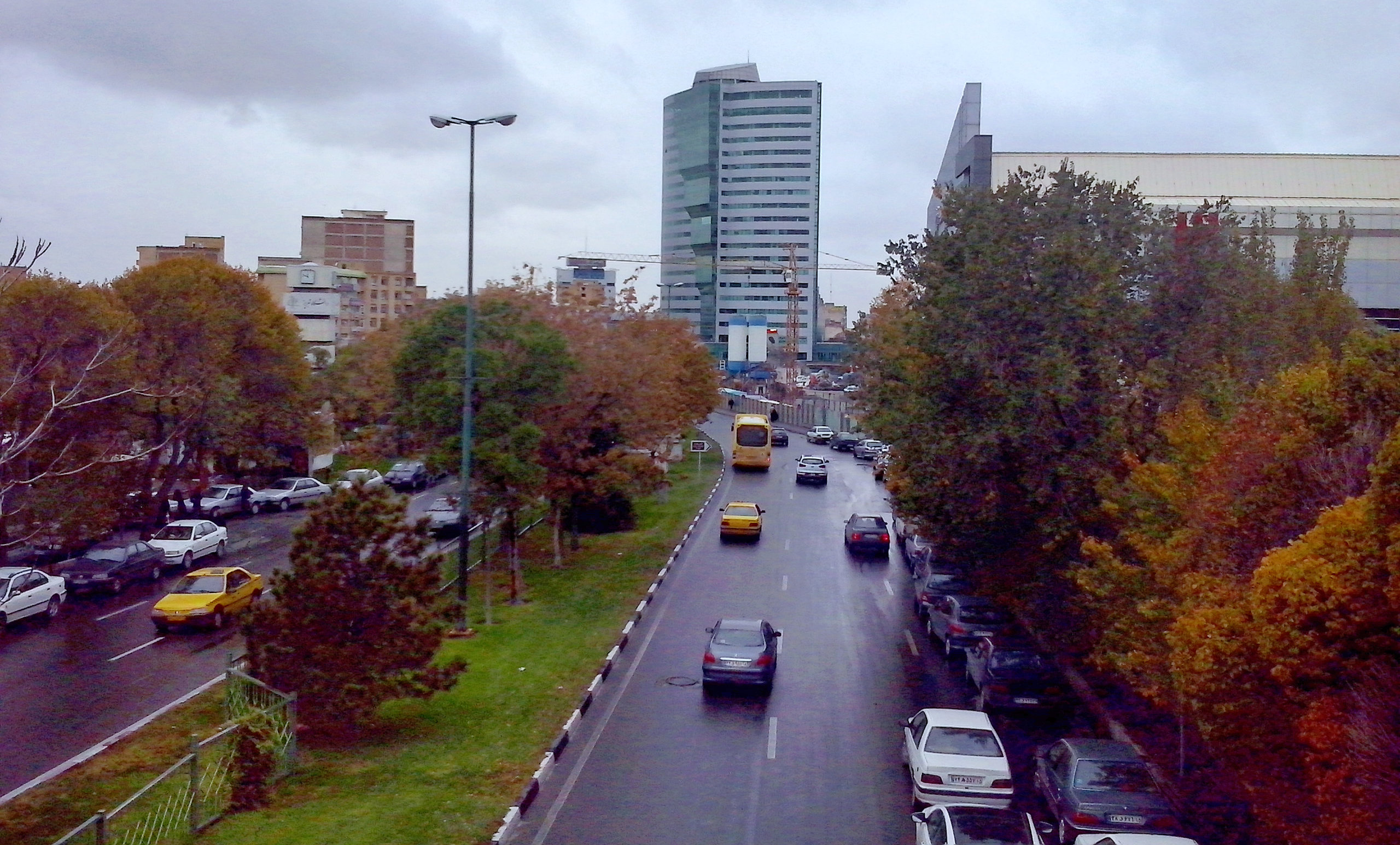 برج بلور تبریز.